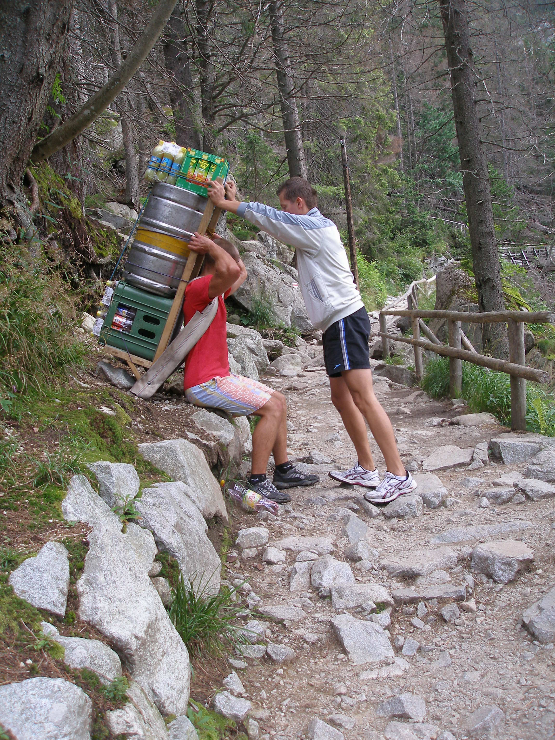 Turistický chodník Hrebienok - Zamkovského chata.